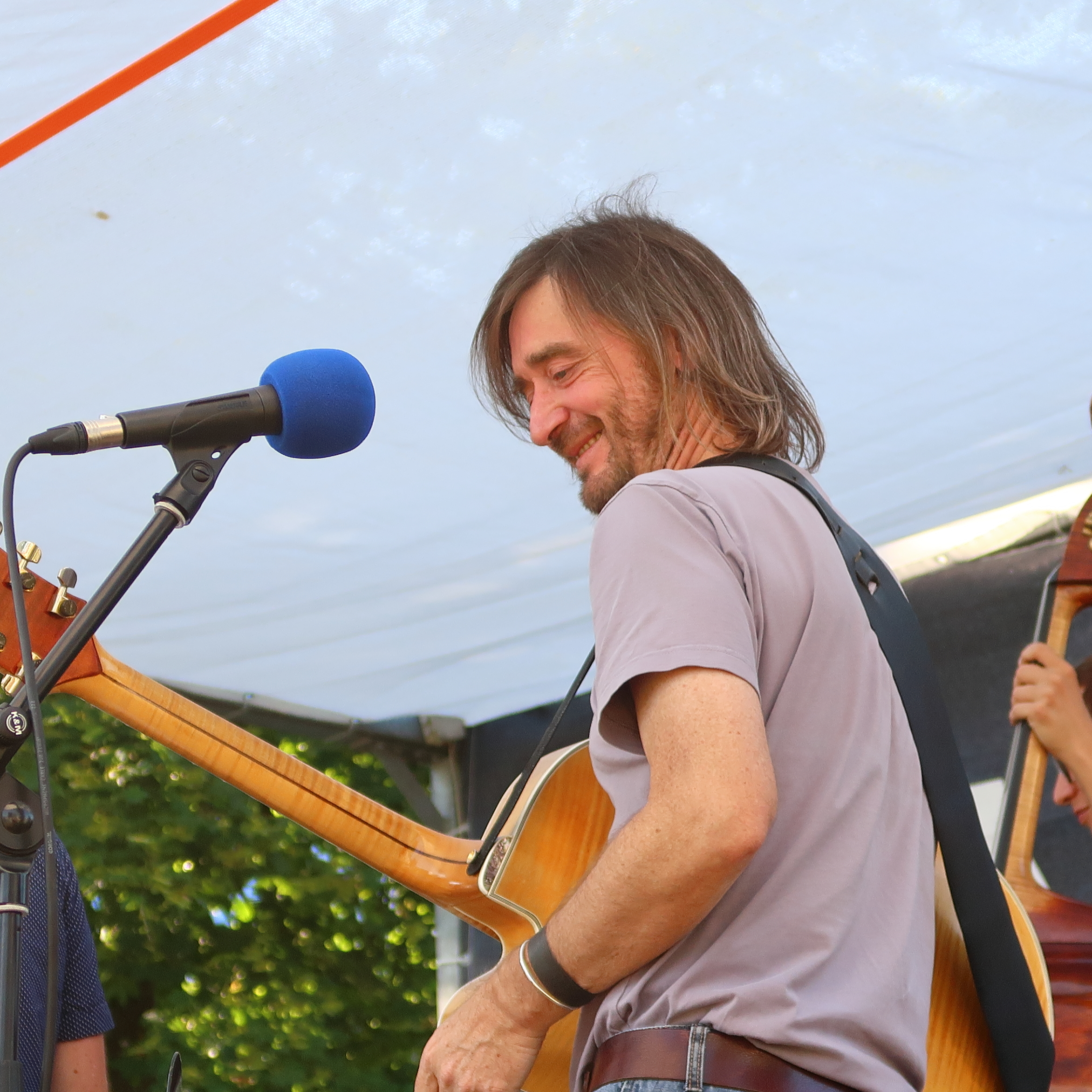 Primus Sitter, Jazz-Gitarrist und Komponist, bei seinem Auftritt bei "Jazz im Park" mit der Gruppe »Manfred Paul Weinberger QuARTet« am 2016-09-10 in Vöcklabruck